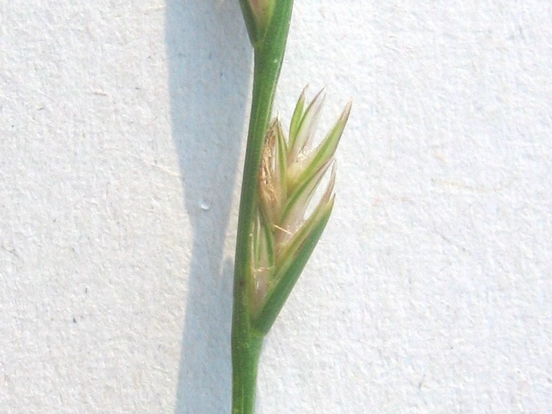 Deutsches Weidelgras Lolium perenne